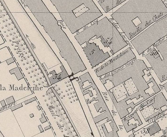 plan du centre ville.